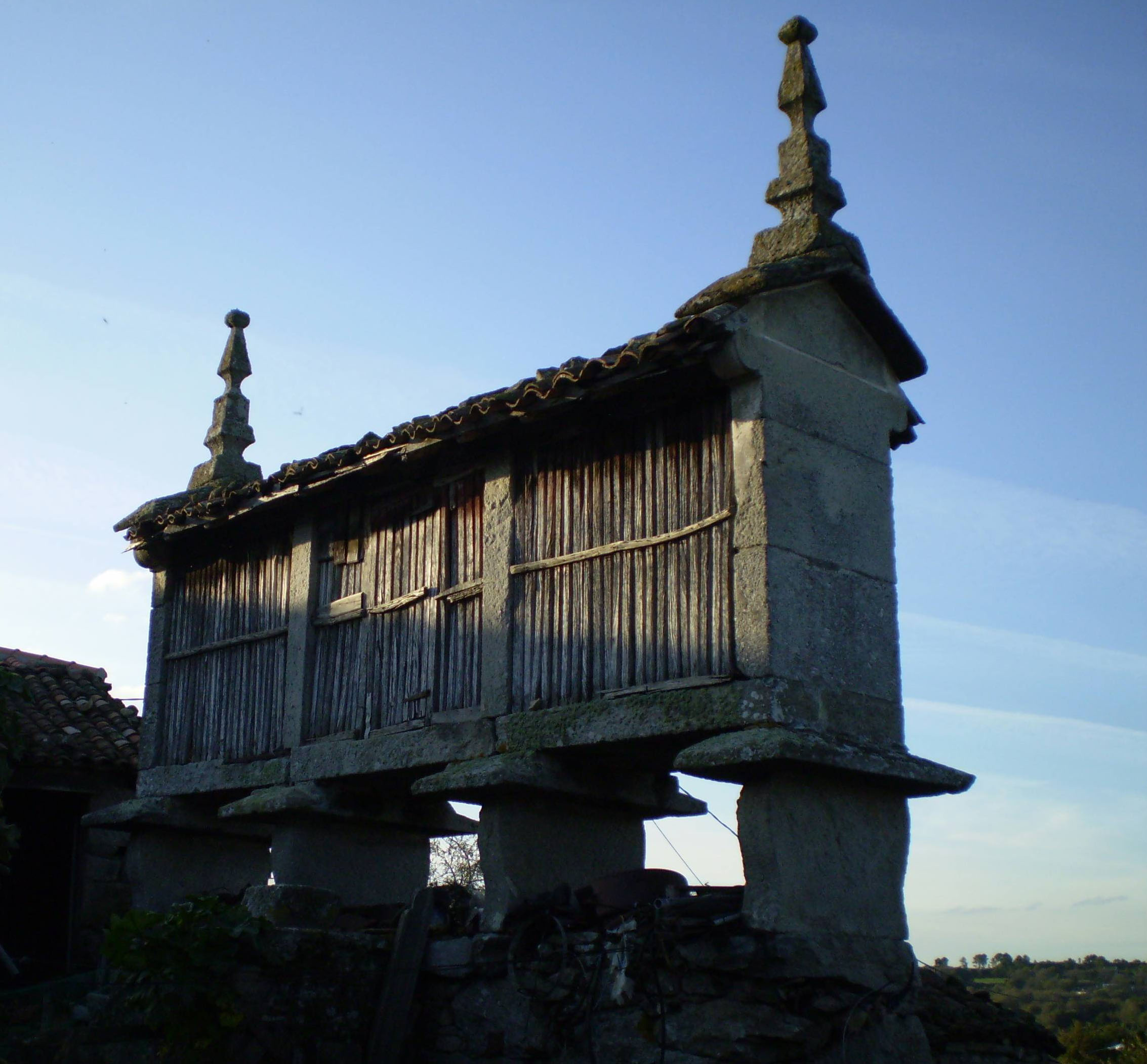 Hórreo de tipo mahía, elevado sobre soleira e cepas catro cepas de cantería con cadansúa ménsula a xeito de tornarratos. Cuberto con tella do país e adornado con dous lampións de figuras xeométricas (cubo, pirámide e esfera). Ubicando en Caira, na parroquia de Amoexa en Antas de Ulla.